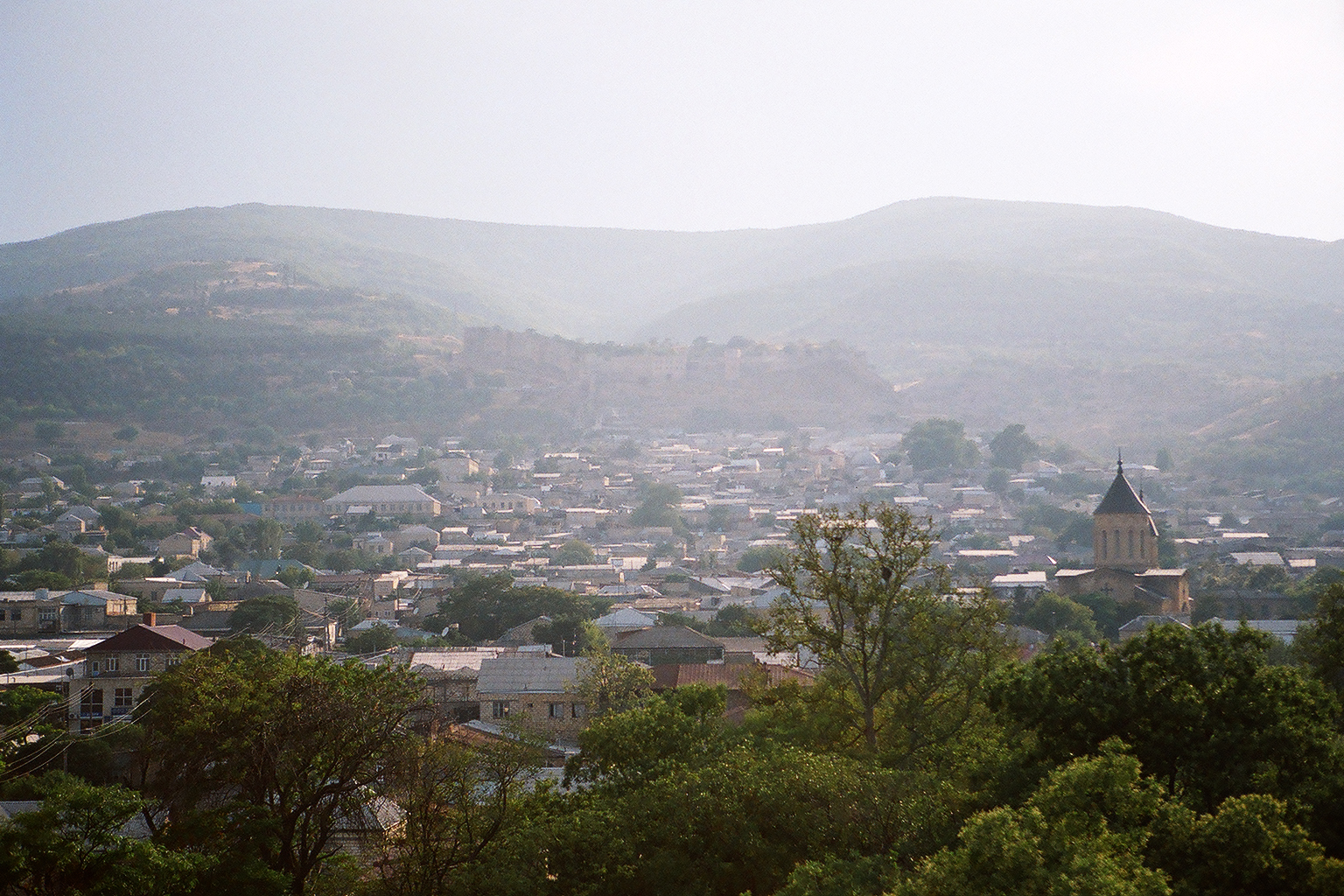 2007.07.31 (?), derbent